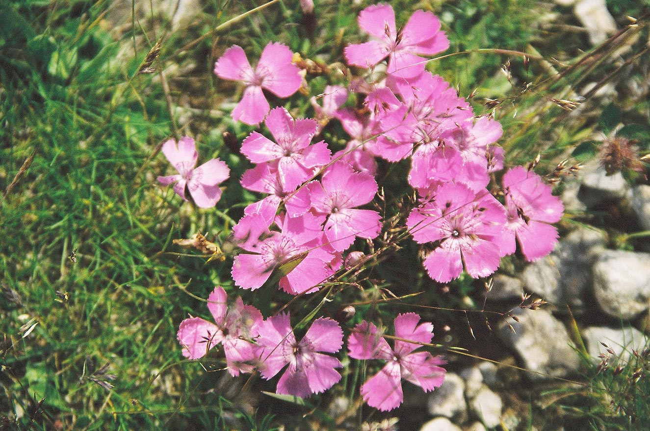 Dianthus alpinus Dianthus alpinus de - Alpennelken, fotografiert auf der Rax in Niederösterreich Fotograf / Photographer: Manfred Werner (User:Tsui - Tsui at de.wikipedia) Datum / Date: July 17. 2005